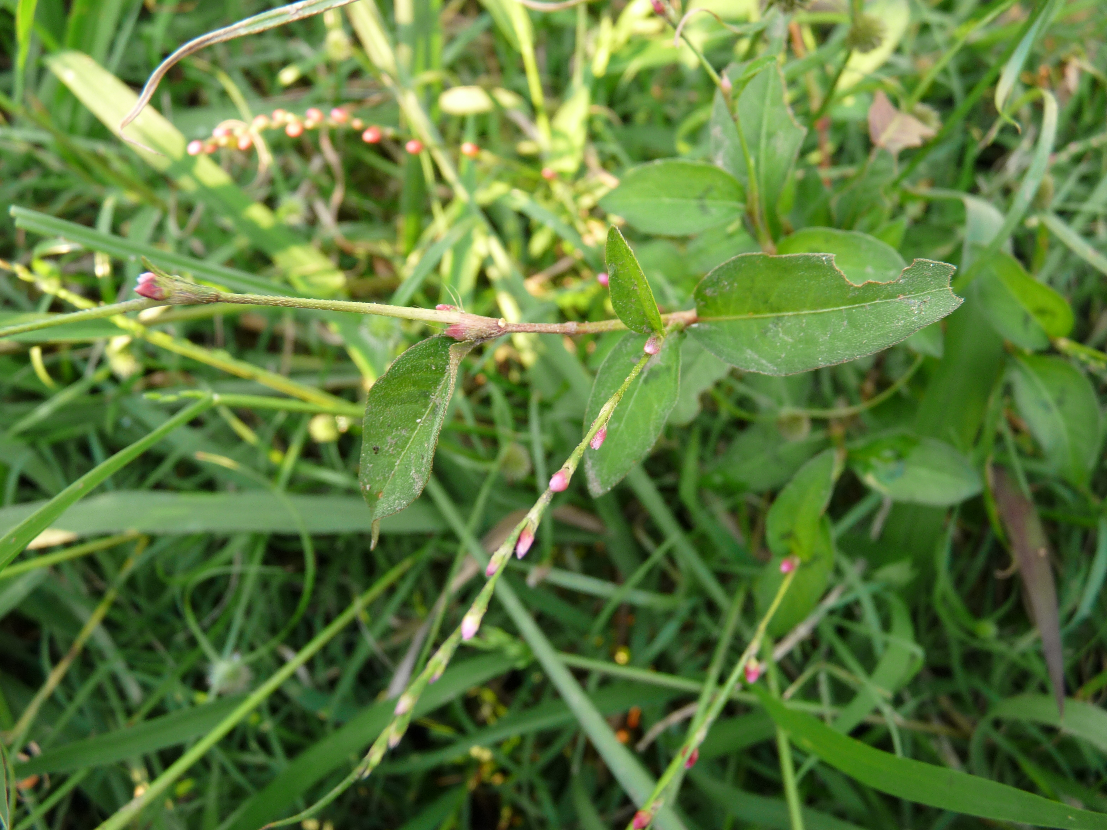 Persicaria pubescens